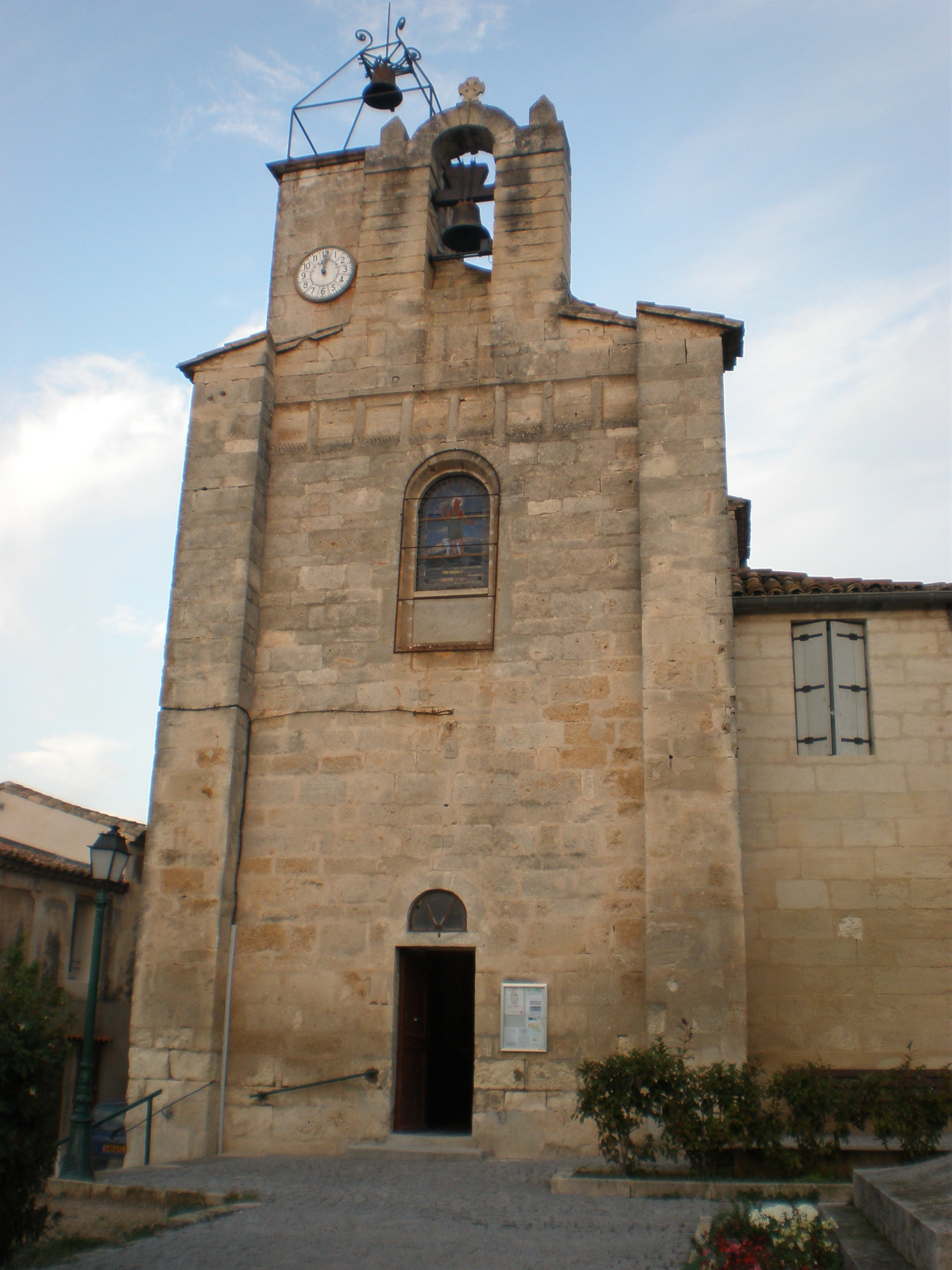 L'église Saint-Martin de Sussargues (Hérault, 34)